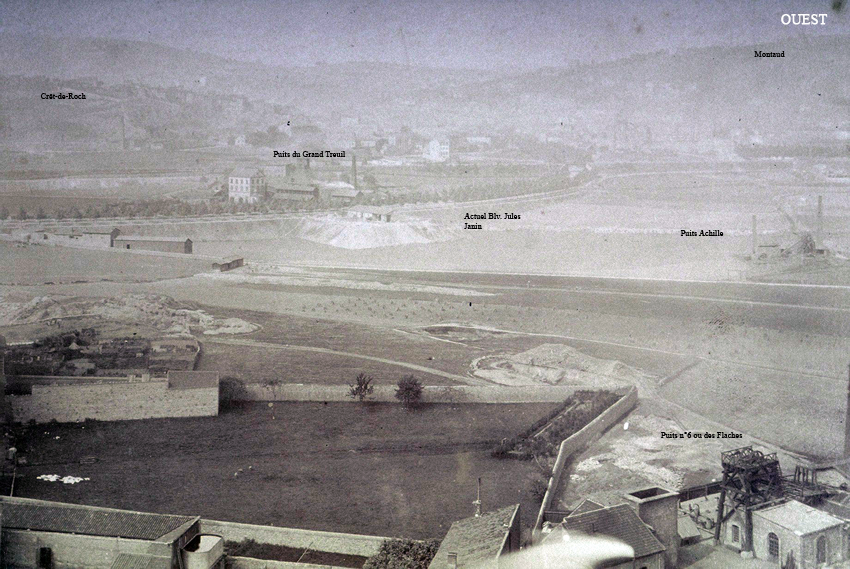 panoramique du clocher du Soleil, Fr, 42